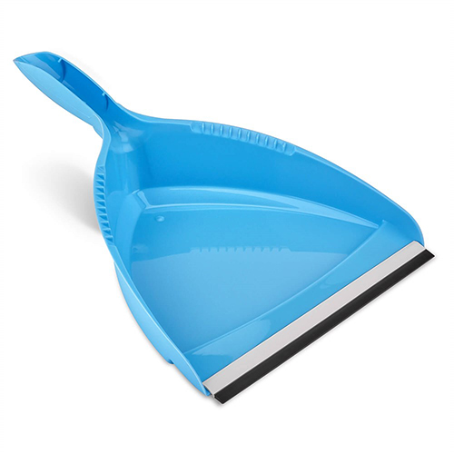 მარგალური: გვამაღაია